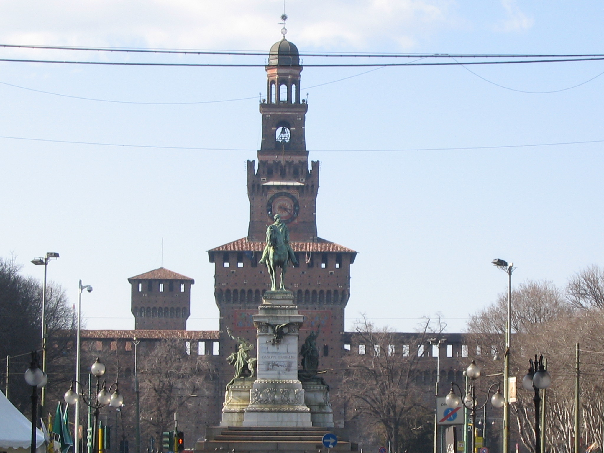 Vita della fronte del Castello sforzesco e della Torre del Filarete da piazzale Cairoli. Al centro, il monumento a Giuseppe Garibaldi.